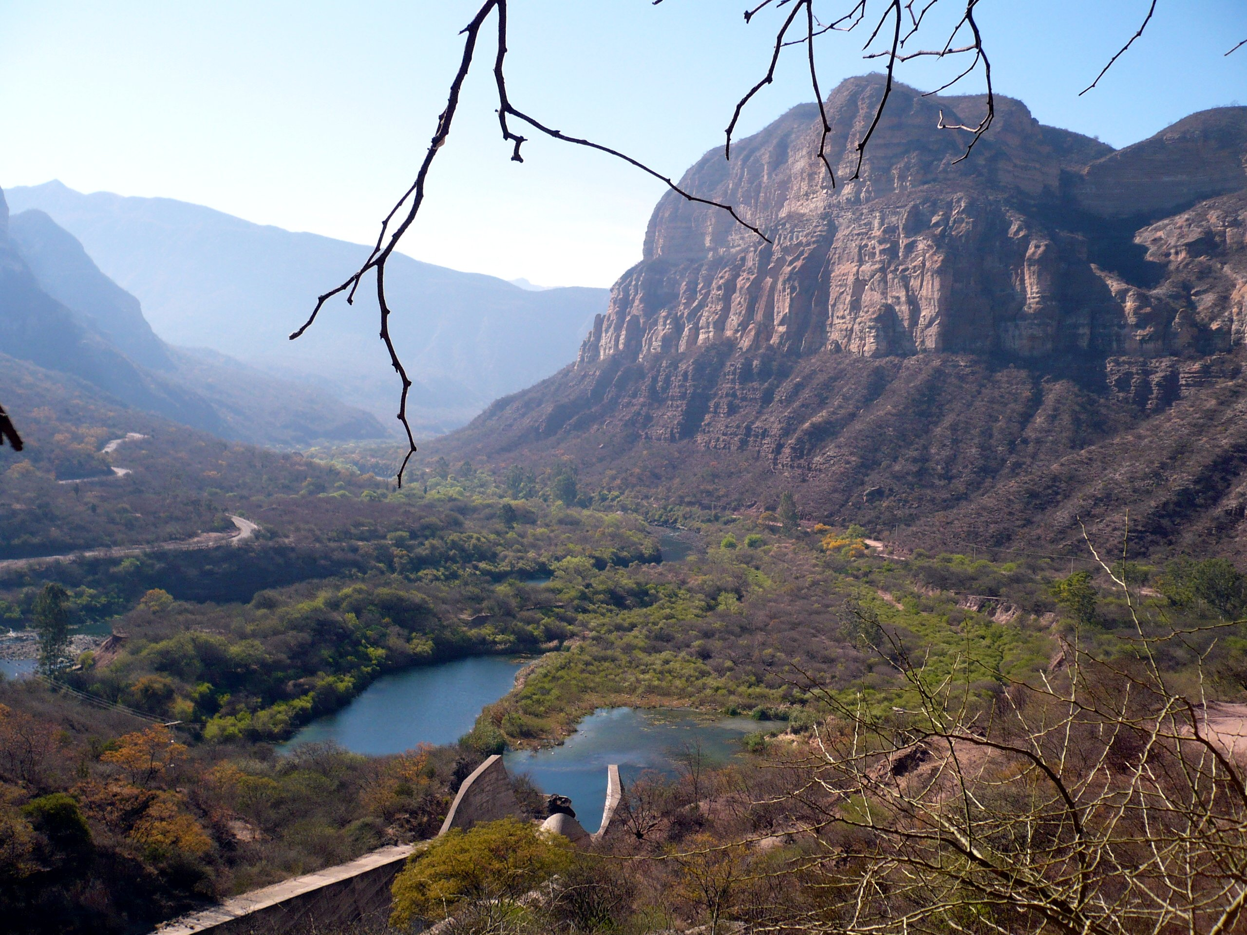 Cañón del Río Juramento cercano a Coronel Moldes